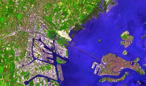 Venezia (comprese Murano, Mestre e Porto Marghera) vista dal satellite.